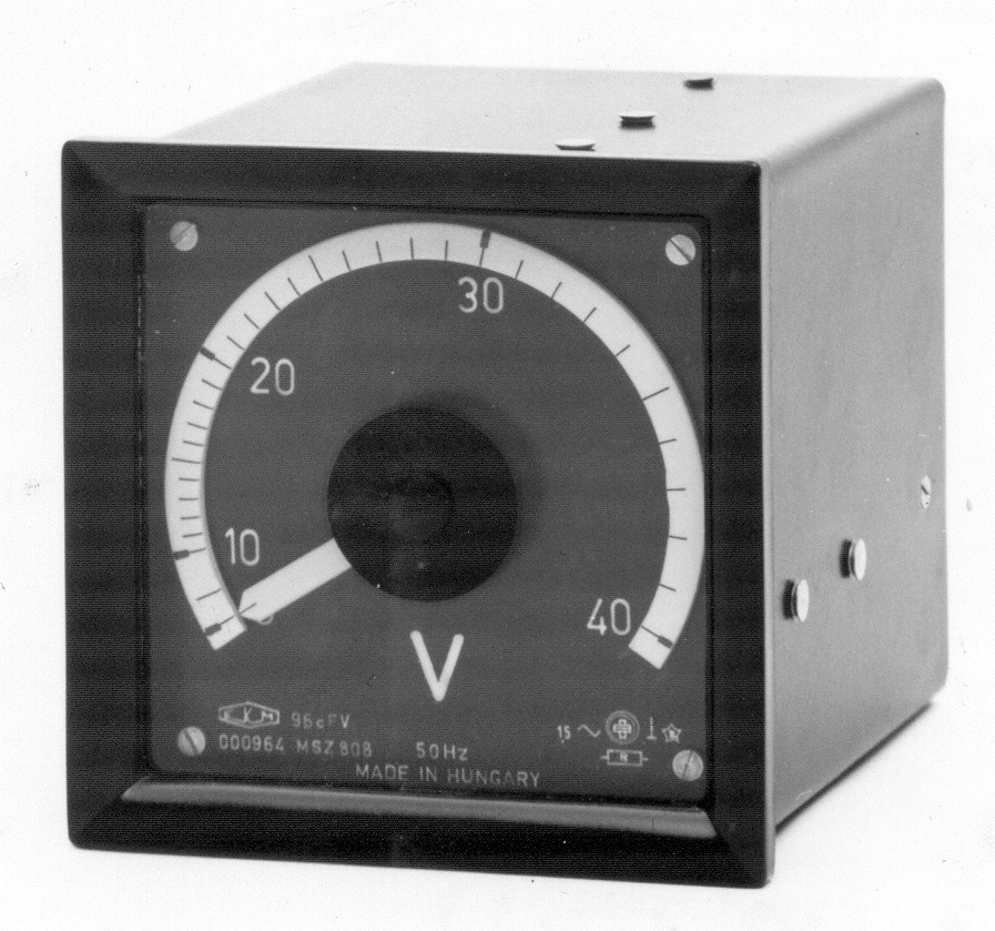 240° kitérésű ferrodinamikus feszültségmérő